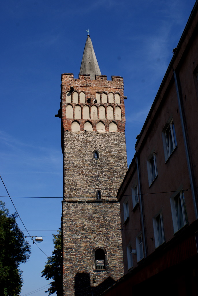 Brama Wrocławska w zespole obwarowań miejskich w Paczkowie.